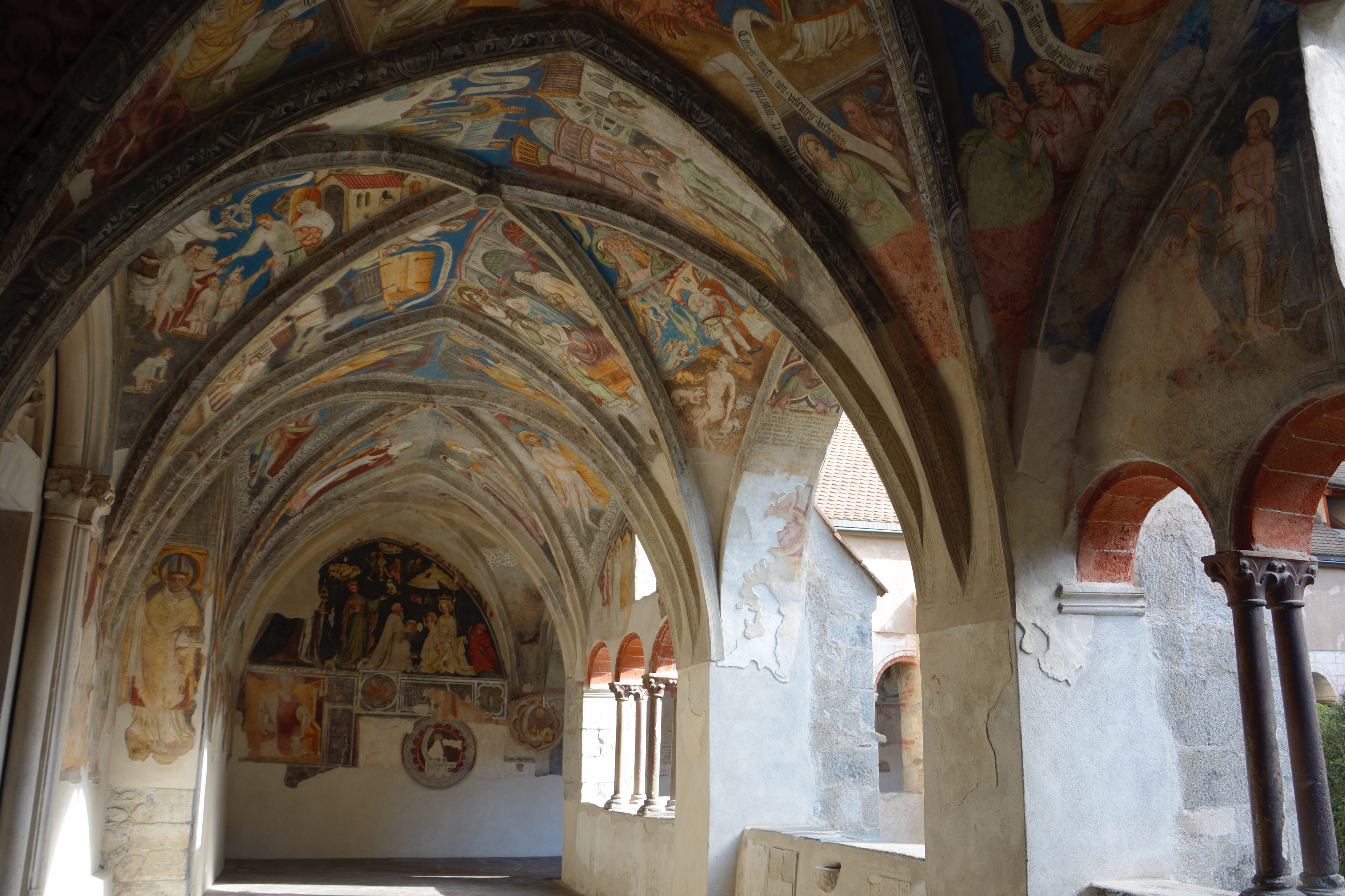 Kreuzgang des Brixner Domes, Nordflügel. Im Vordergrund die 11. Arkade mit Fresken eines unbekannten Meisters, um 1390. Dahinter die Arkaden 12 und 13.